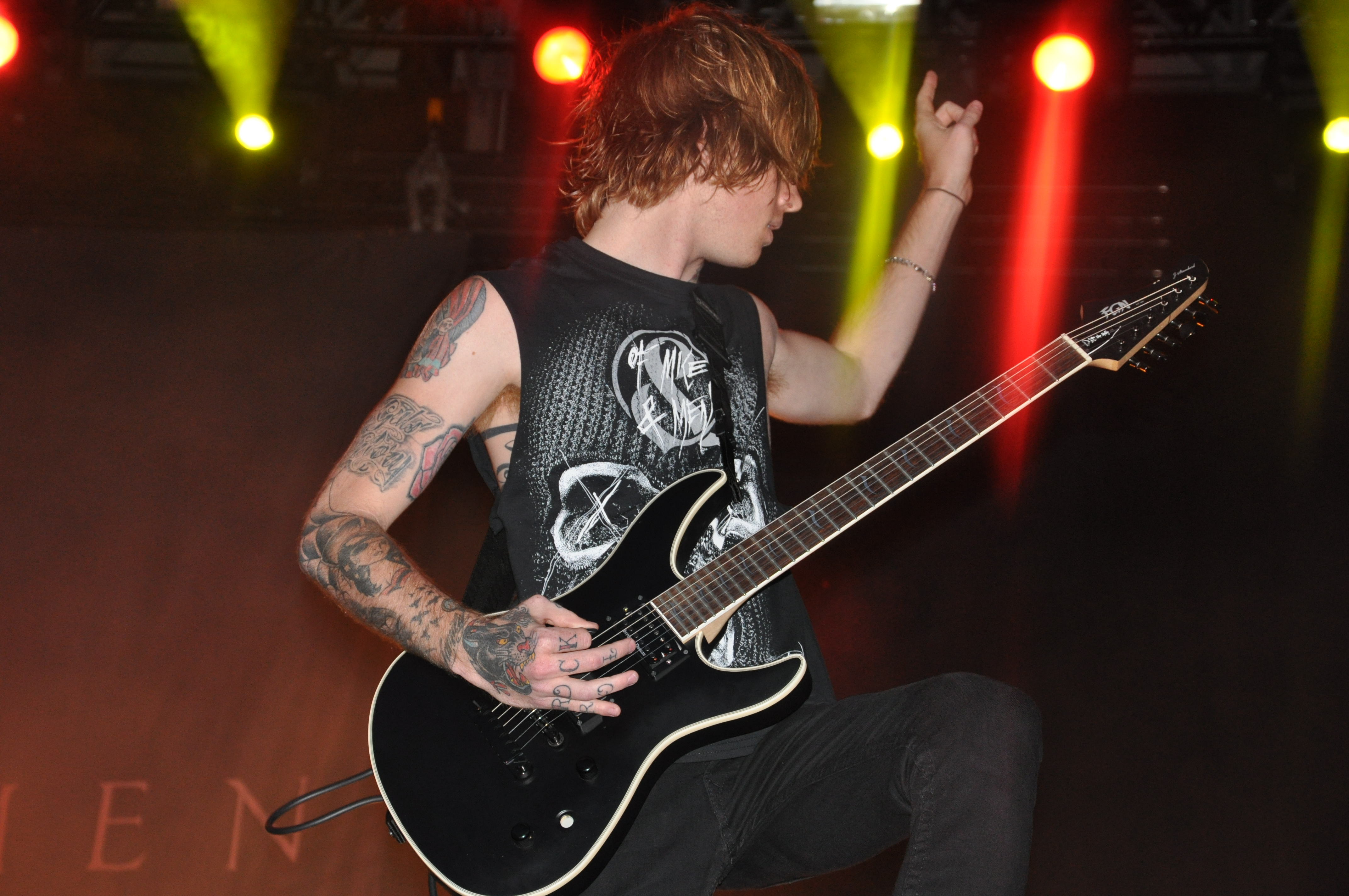 Of Mice & Men auf der Clubstage bei Rock am Ring 2014